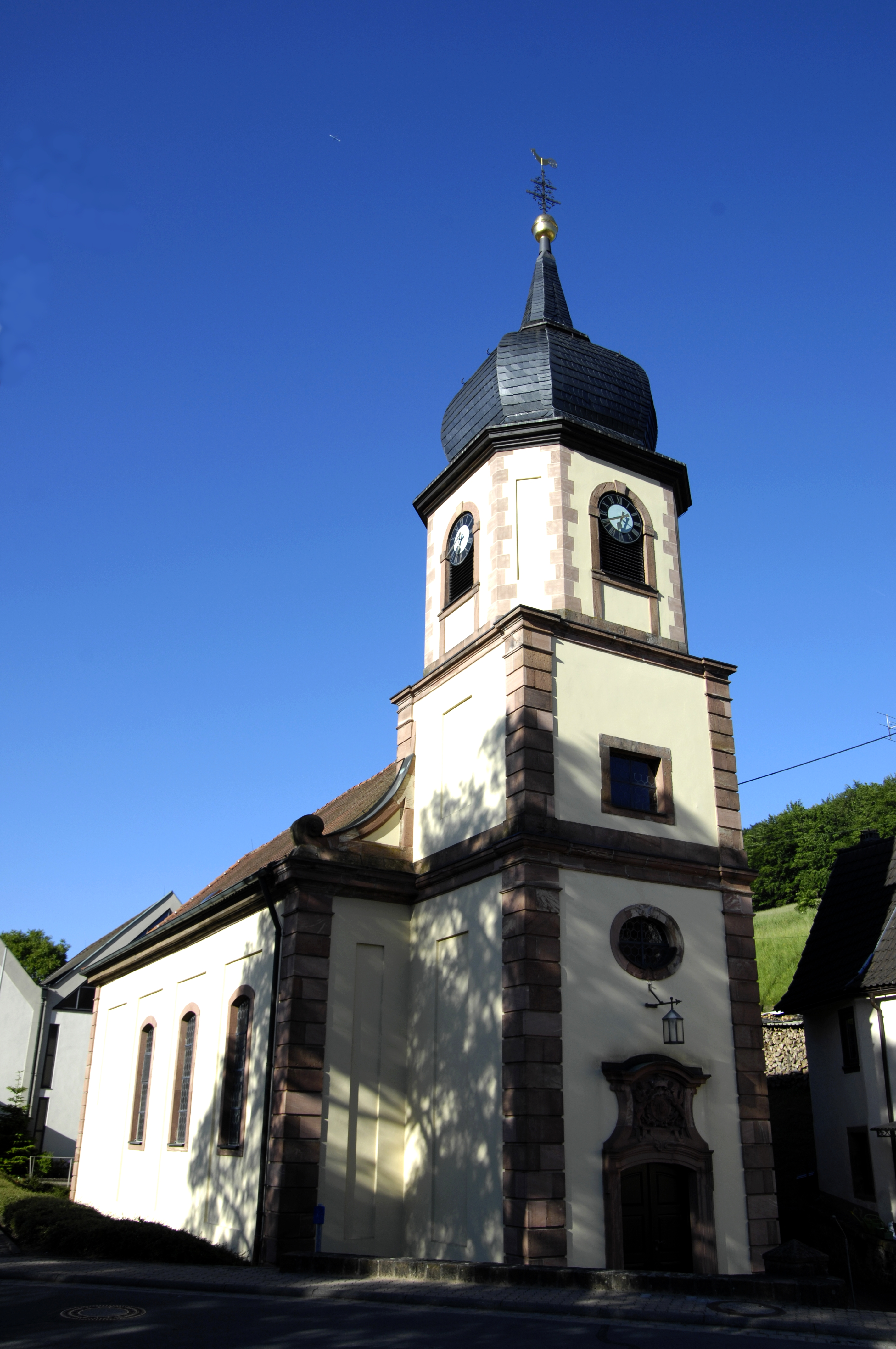 Hobbach im Spessart, Alte Kirche St. Johannes d. T. Akten-Nr. D-6-76-123-11